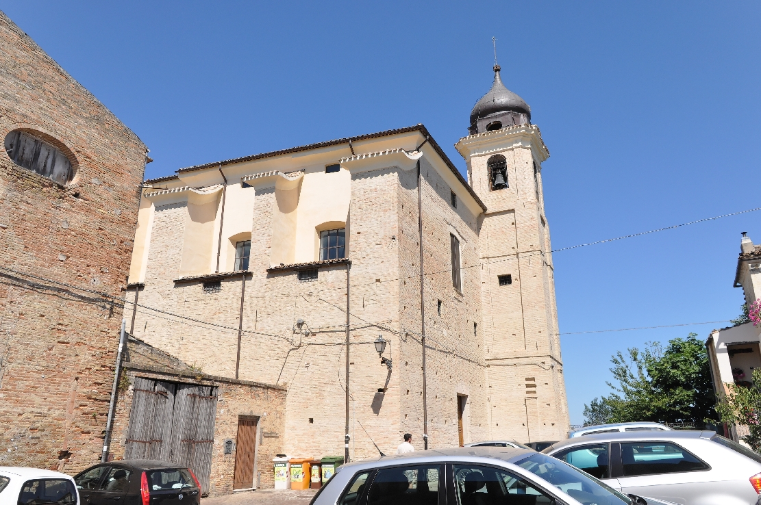 Penne (comune, Italy) 2012